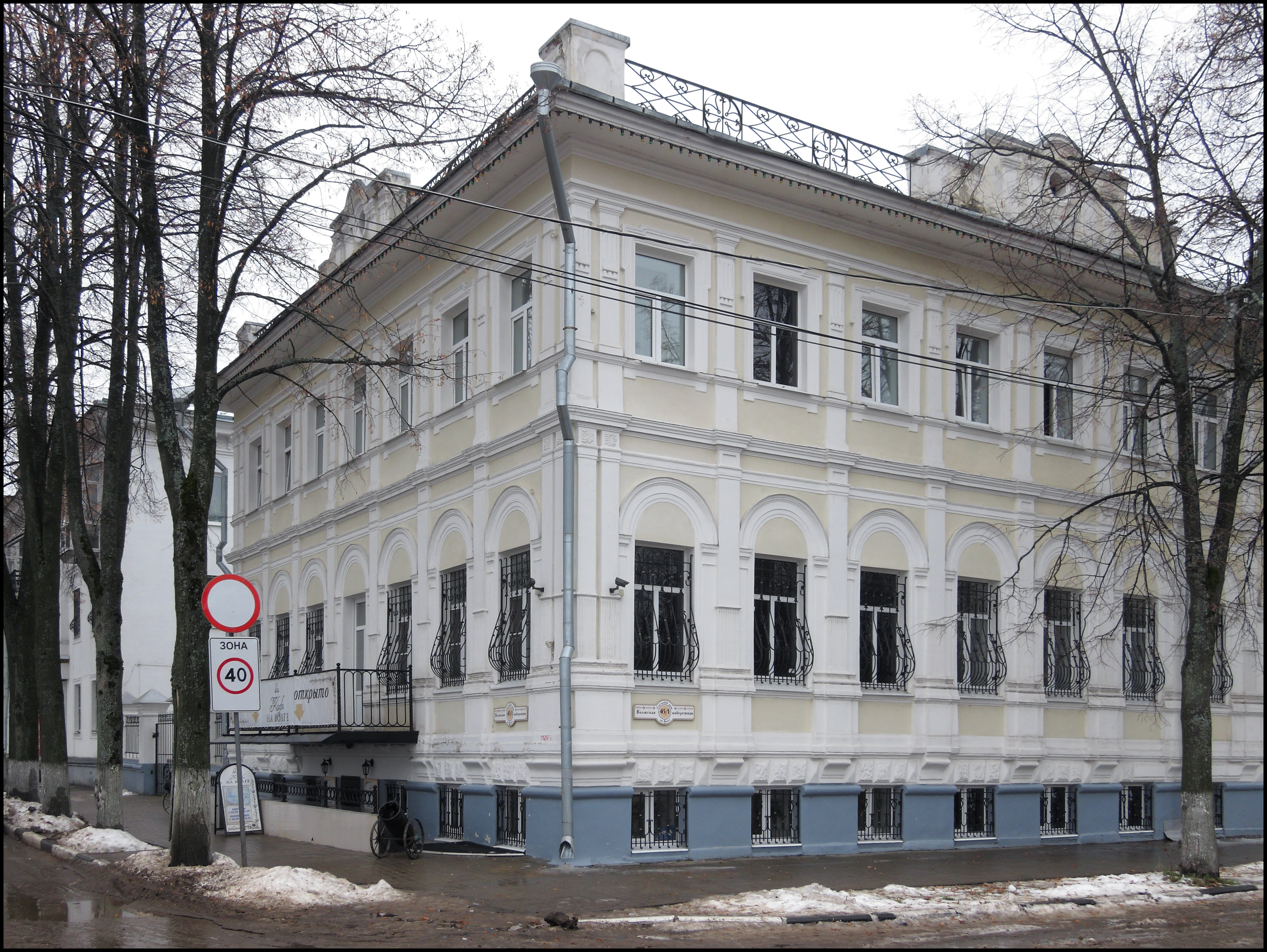 Дом князя И. А. Куракина (Ярославская область, Ярославль, Волжская наб., 45/1)